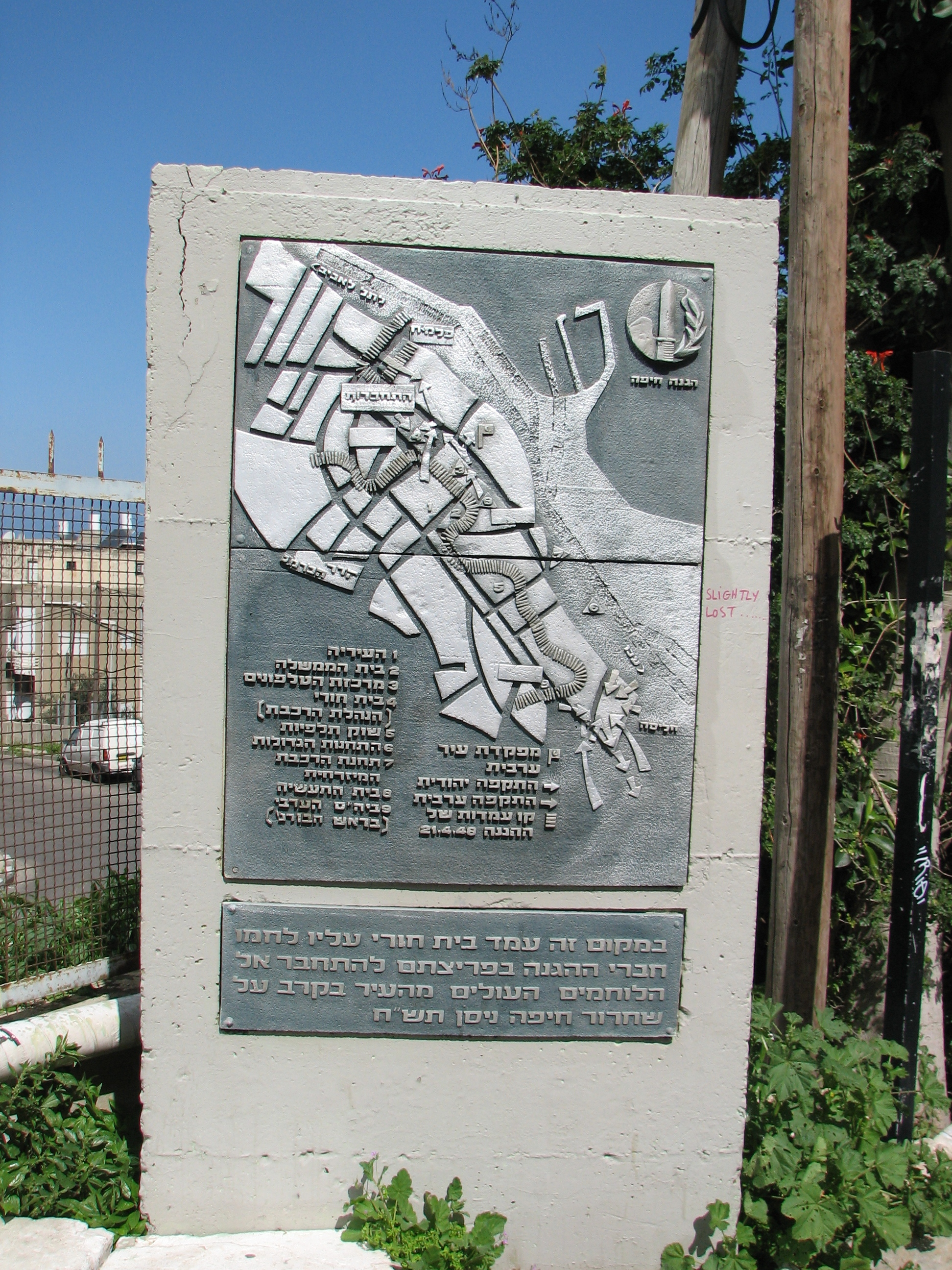 Streets in Haifa, Israel רחובות בעיר חיפה תבליט המציין את הקרב במלחמת העצמאות בשנת 1948 ליד בית שהיה בעבר בית משפחת ח'ורי. הבית נפכע מאד במלחמה, הוא נהרס ובמקומו נבנה מגדל הנביאים. התבליט נמצא בקצה רחוב מעלות הנביאים